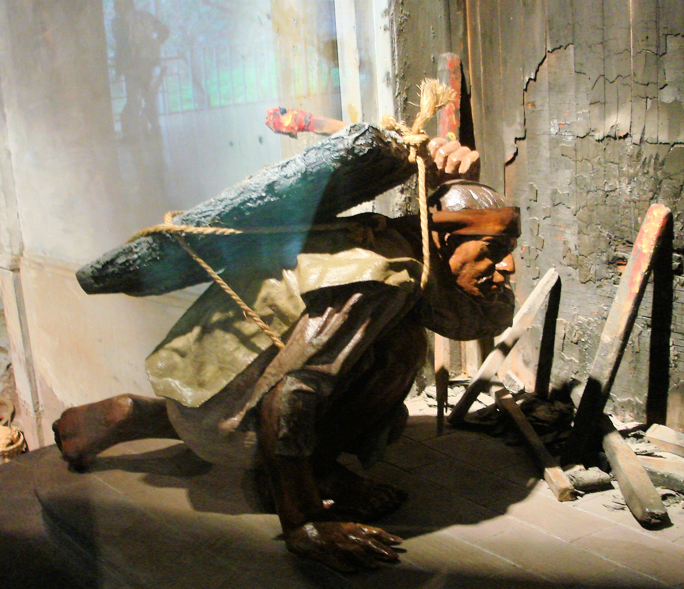 El Pípila, detalle del diorama en el Museo del Caracol de la Ciudad de México sobre el asalto a la Alhóndiga de Granaditas en 1810.